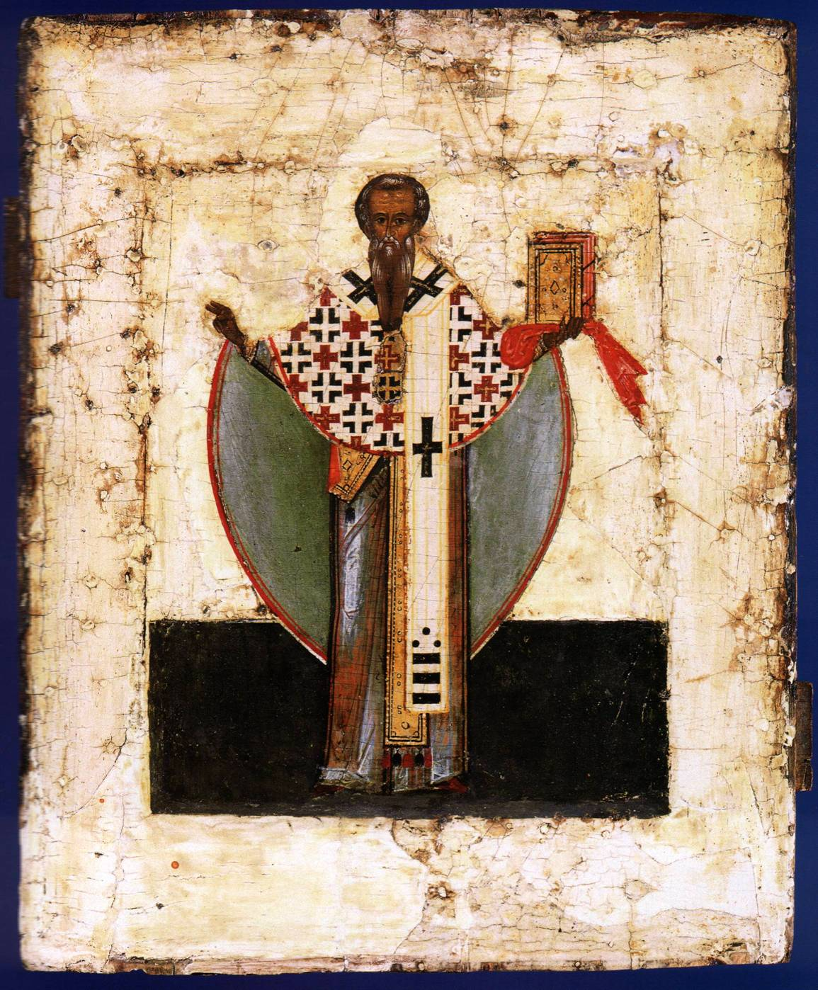 Святой Иаков брат Господень 16 век. Новгород (?) Дерево, левкас, темпера. 31,1х25.4 см. Надпись с именем святителя не сохранилась, но иконография - черты его лика и форма бороды подсказывают, что это Иаков брат Божий, апостол из числа семидесяти, ставший первым епископом Иерусалима, который был сыном Иосифа от первого брака и, следовательно, приходился братом Иисусу Христу по плоти. В византийском искусстве изображается в числе чтимых отцов церкви. Как творец первой литургии, содержавшей заупокойные службы, и автор послания, в котором говорится об исцеляющей силе молитвы (Иак.5:14-16), он с древних времен почитался еще и в качестве целителя. День памяти - 23 октября, а также 4 января - в числе Семидесяти апостолов. В Новгороде ему молились об избавлении от эпидемий. (См.: Иконы Твери, Новгорода, Пскова XV- XVI вв. ЦМиАР. Каталог собрания: Серия иконы / Ред.-сост. Л.М. Евсеева, В.М. Сорокатый. М., 2000, с. 167). Самостоятельные иконные изображения Иакова Иерусалимского очень редки. Известны новгородские иконы, на которых он изображен вместе с другими святыми: "Никола Чудотворец, Иаков брат Божий, Игнатий Богоносец" конца XV в. (ГРМ) и "Иаков брат Божий, Косма и Дамиан" второй четверти XVI в. По мастерству исполнения и художественным достоинствам икона является памятником столичного уровня. Она могла быть создана в лучших мастерских Москвы или Новгорода середины XVI в. Но особенности исполнения лика позволяют считать, что ее автором был новгородский иконописец. Икона является художественной, историко-культурной, научной и музейной ценностью